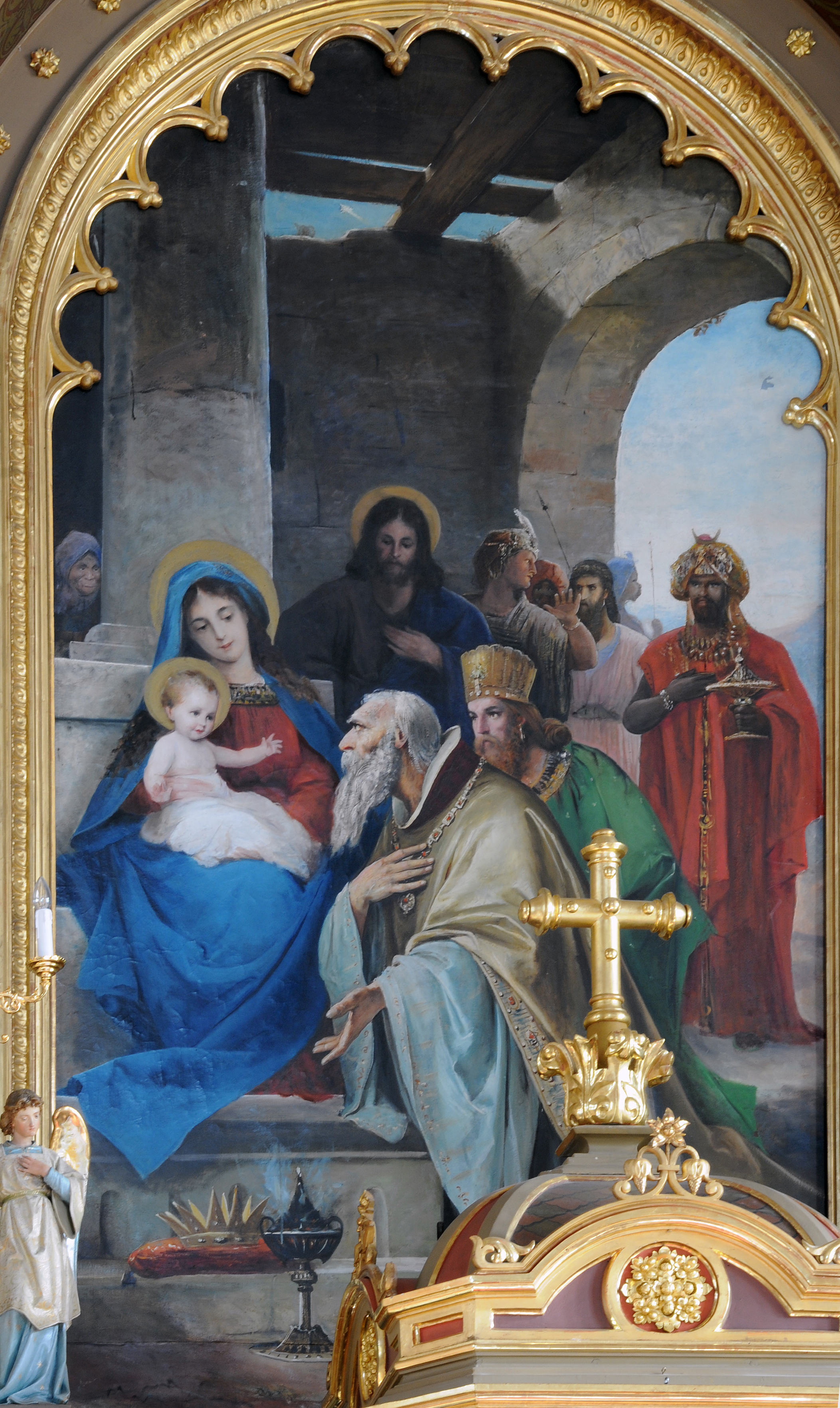 Main Altar